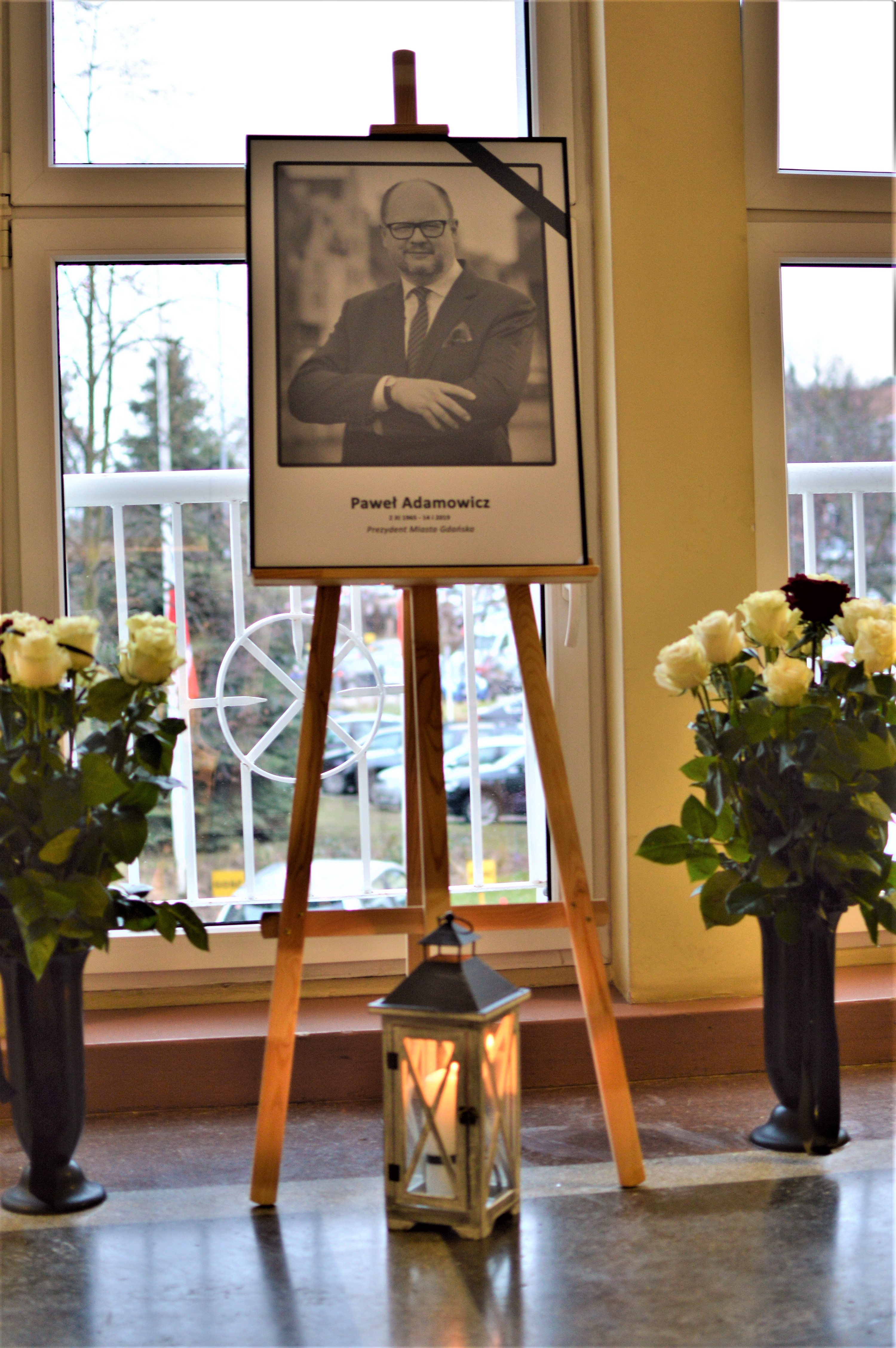 Urząd Miasta w Gdańsku, 15 stycznia 2019 - portret Pawła Adamowicza w hallu Urzędu